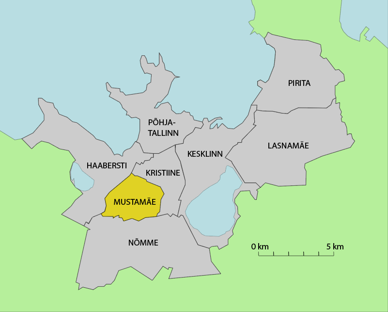 Kaart Mustamäe linnaosa paiknemisest Tallinnas.